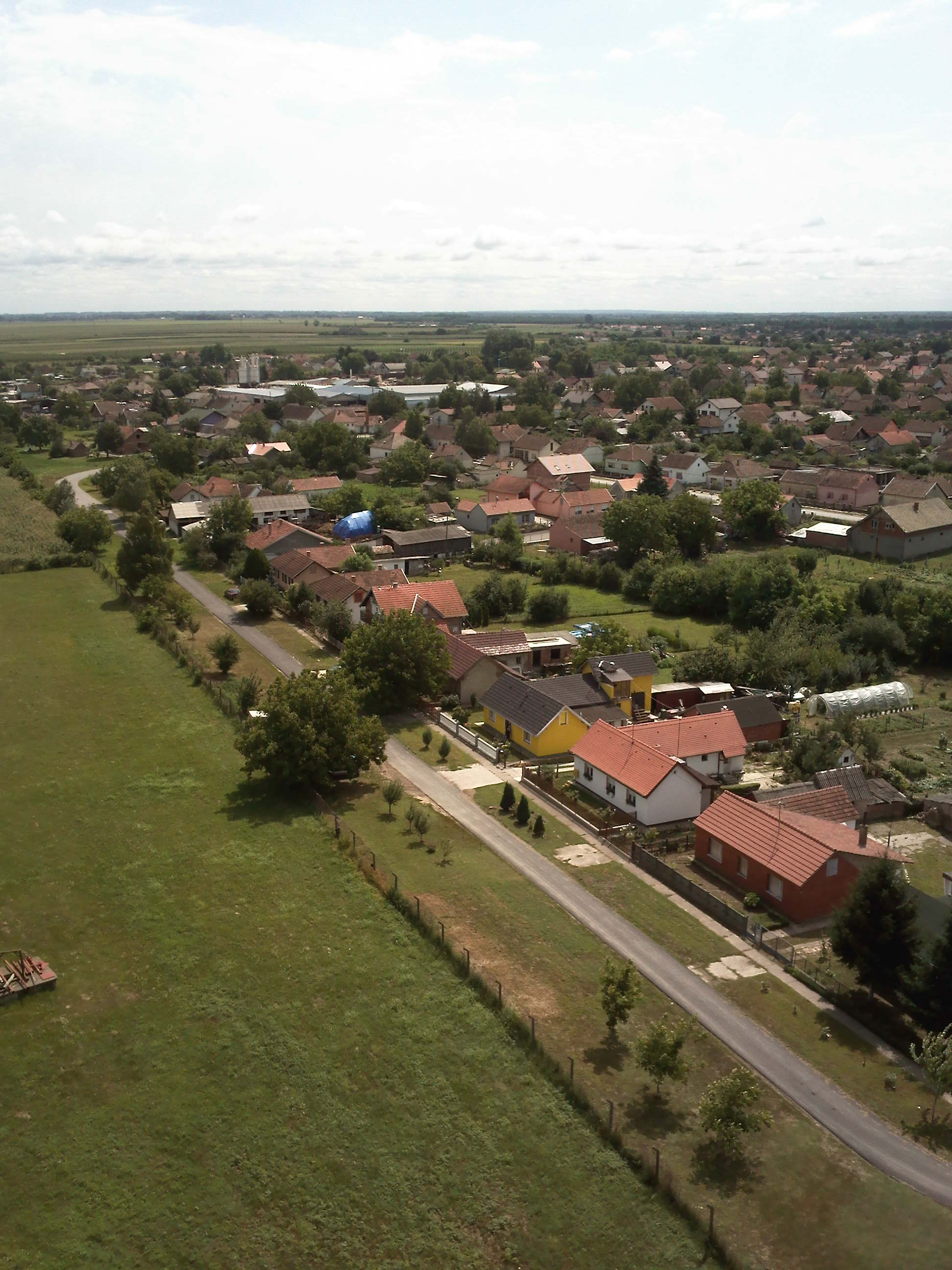 Darda, Croatia